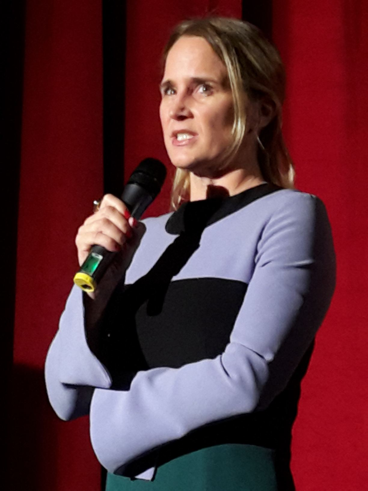 Nicola Graef bei der Premiere ihres Dokumentarfilms über Neo Rauch im Abaton-Kino in Hamburg